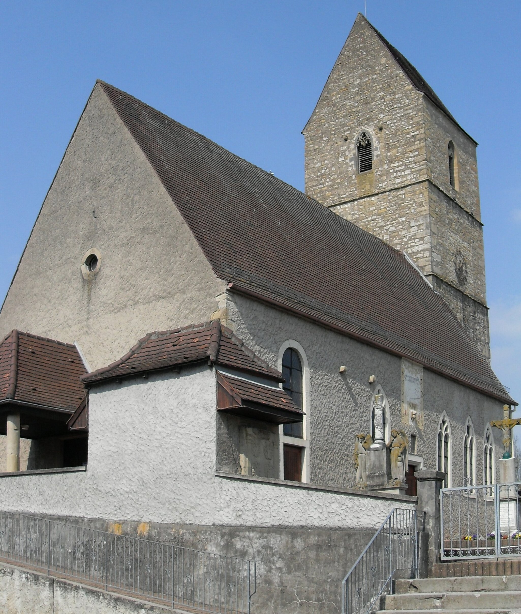 L'èglise Saint-Maurice à Steinbrunn-le-Haut